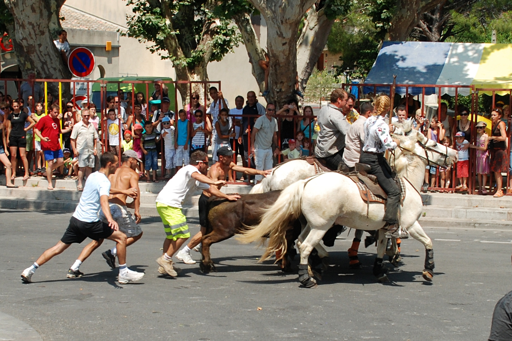 France - Gard - Calvisson - Abrivado - Atrapaïre. Un Attrapaïre est un homme, généralement jeune, qui attrape les taureaux de Camargue lors de leur passage au cours des Abrivado et des Bandido.